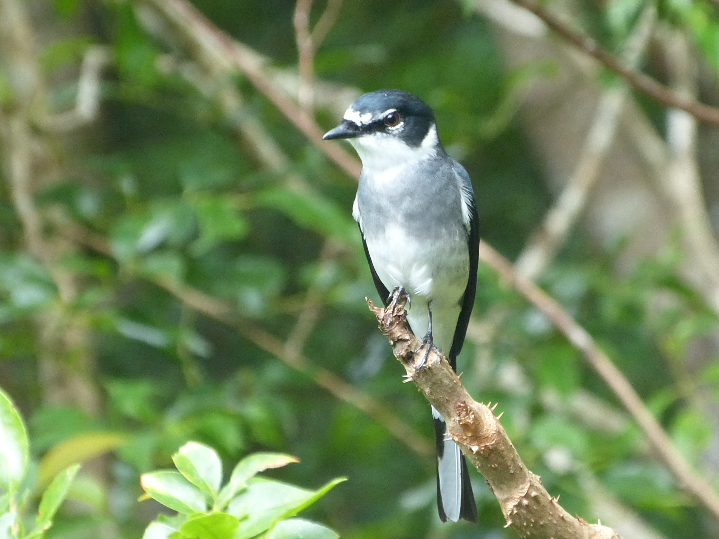 リュウキュウサンショウクイ Pericrocotus tegimae(沖縄県国頭村)